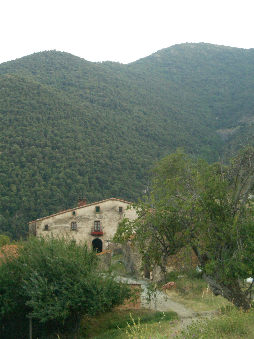 Mas El Samont, a Sant Pere de Vilamajor (Vallès Oriental), Montseny, Catalunya